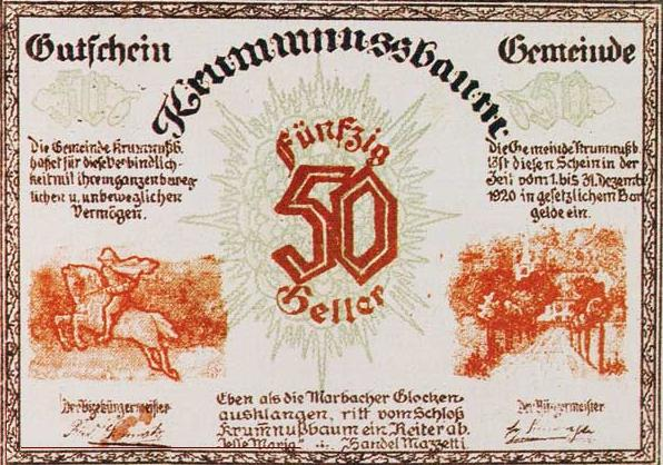 Notegeld (dinheiro de emergência, emitidos em épocas de guerra) da comunidade de Krummnussbaum, no valor de 50 Heller, de 1920. Peça ROUBADA do Museu Paulista (ou do Ipiranga), São Paulo, Brasil.